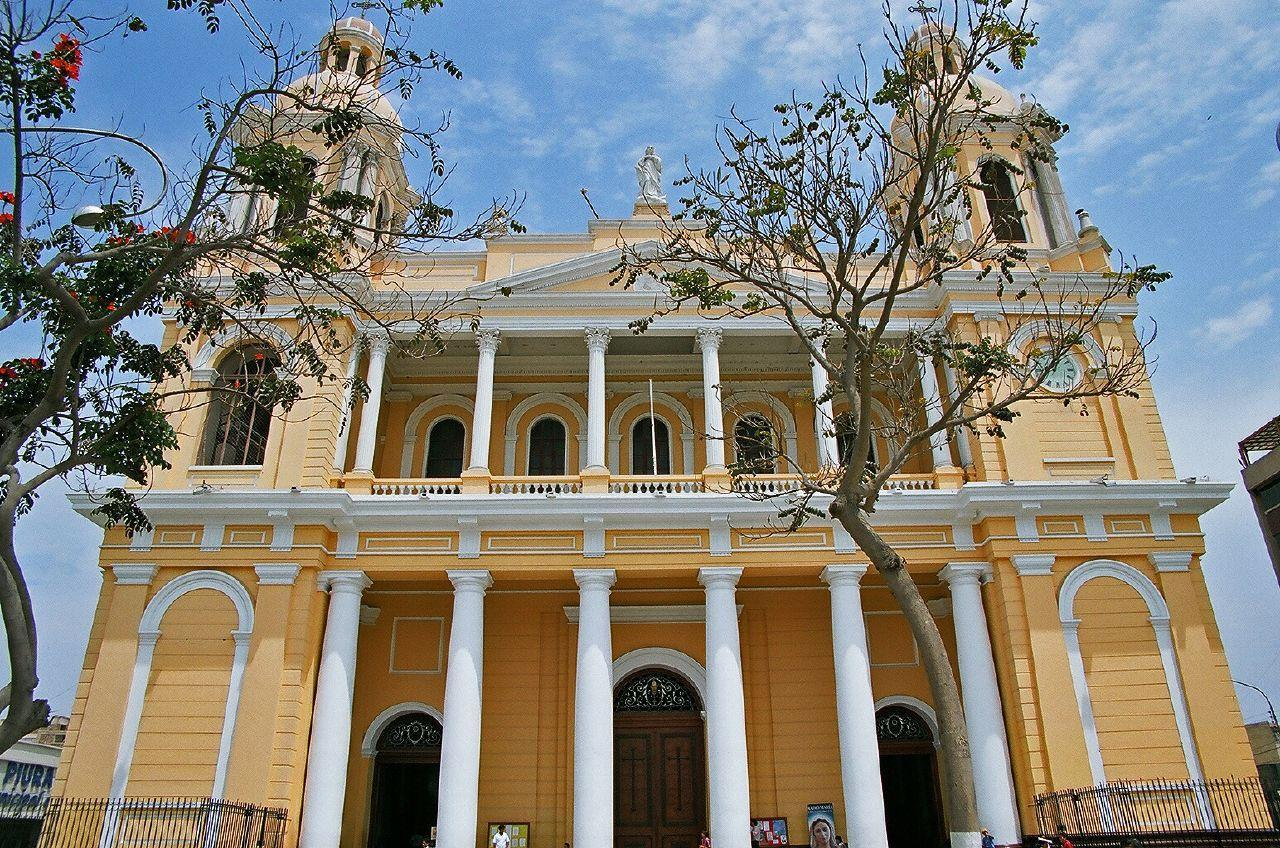 CHICLAYO